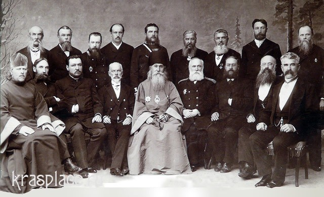 Краснаярскі губернскі камітэт Апякунскага пра турмы таварыства, 1892